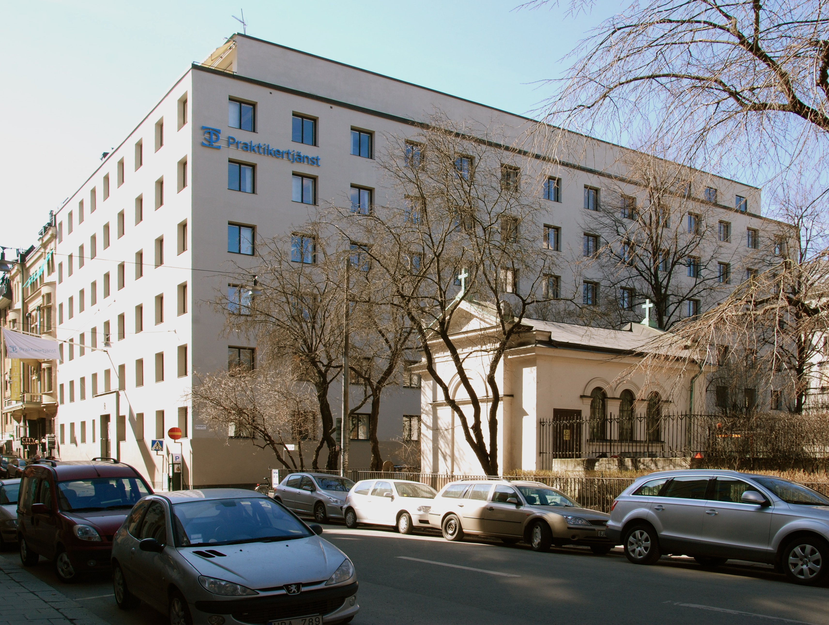 Riksförsäkringsanstalten, Riksförsäkringsanstaltens forna byggnad, här märkt som Praktikertjänsts huvudkontor.